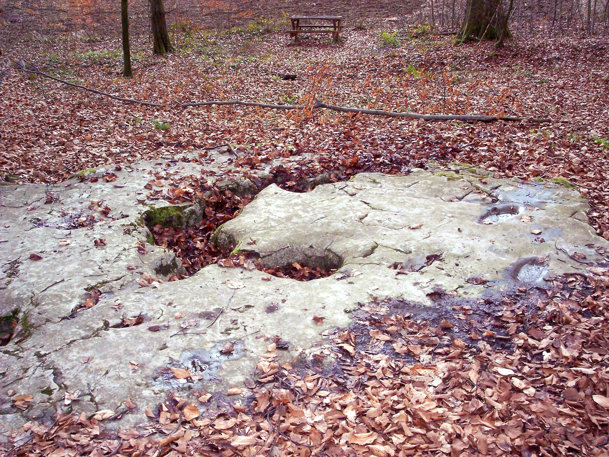 Rocher des Pas du Diable. Saint-Dizier-l'Evêque. Territoire de Belfort